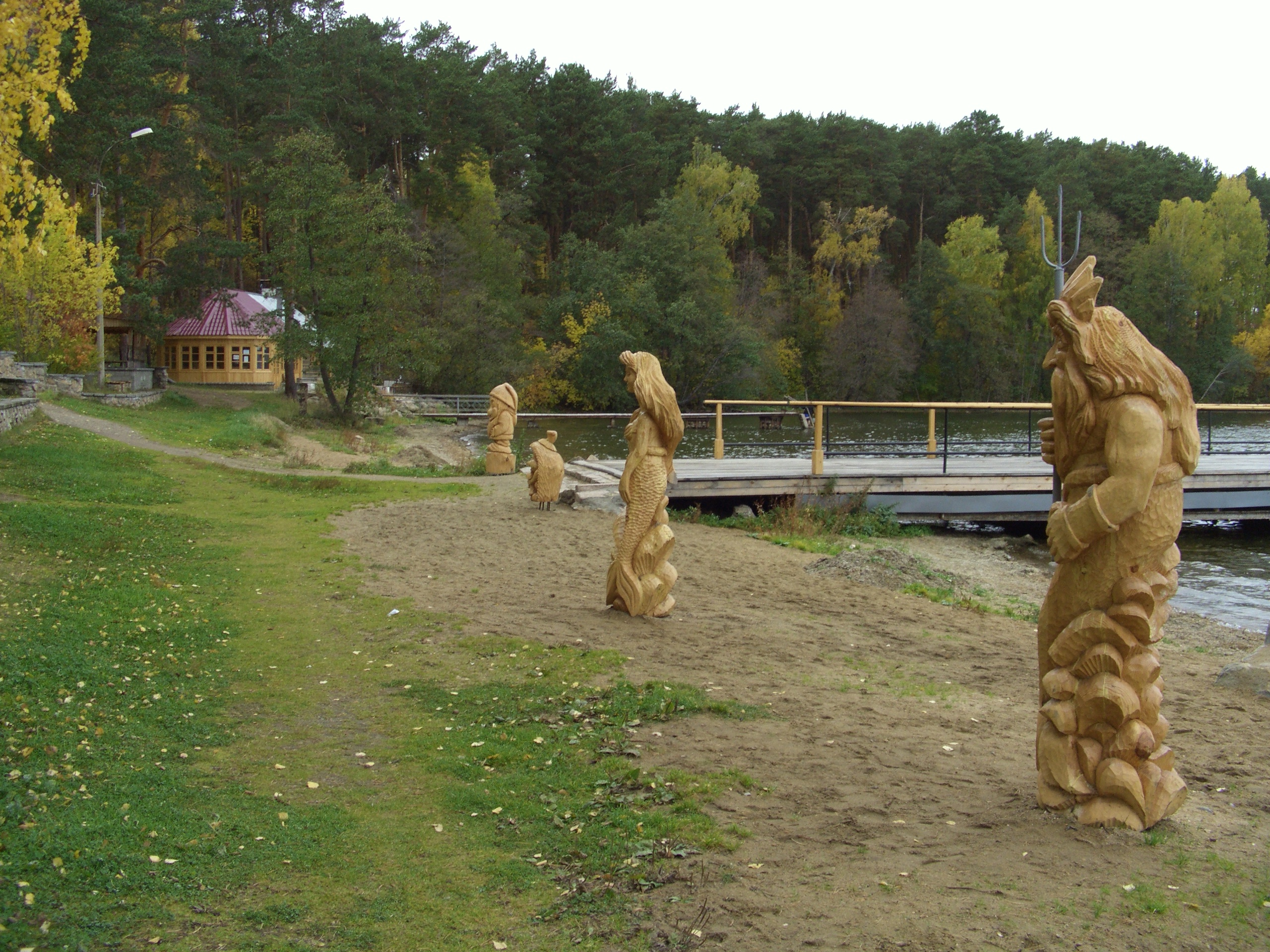 Пляж санатория